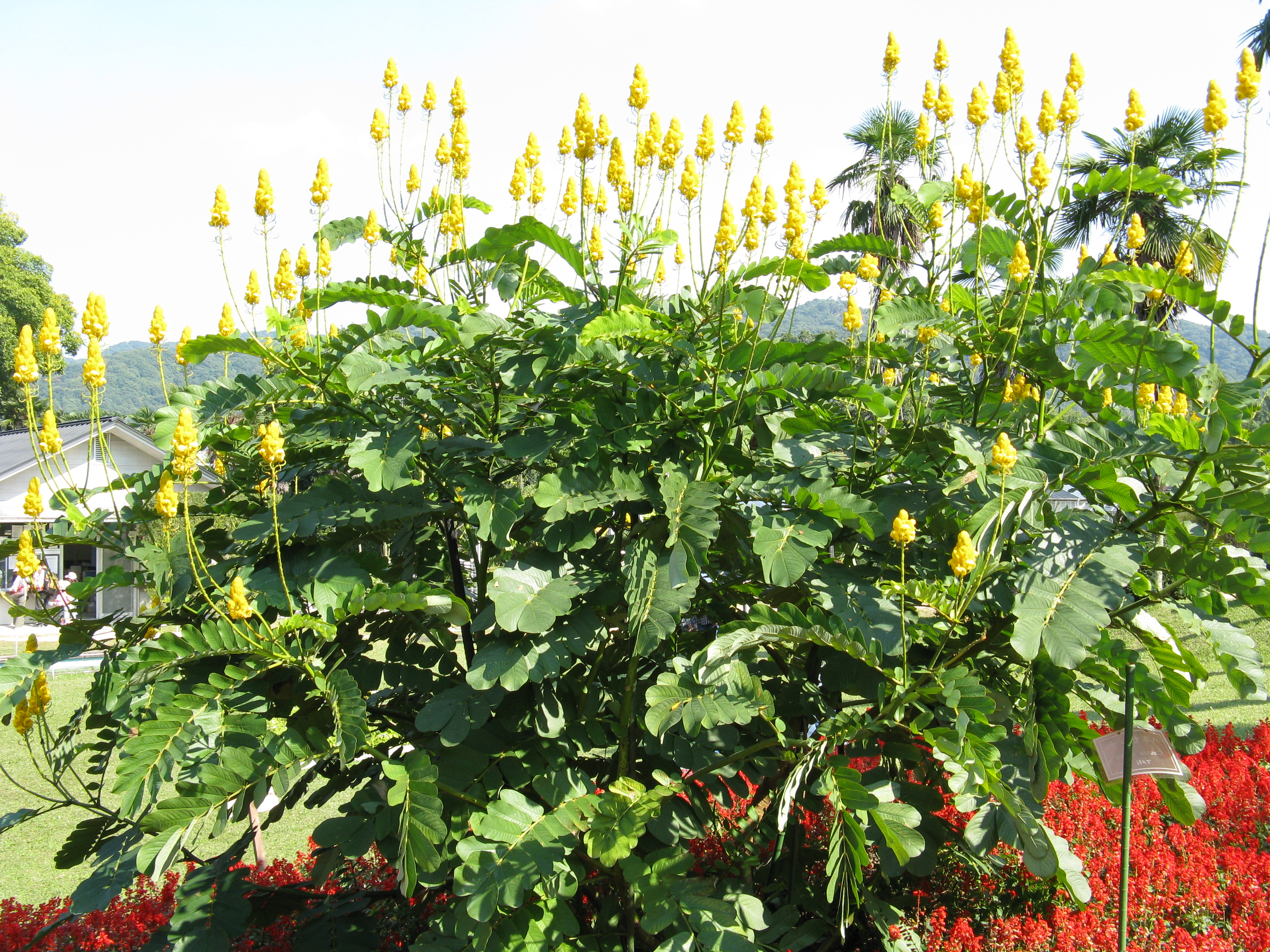 Scientific name Senna alata